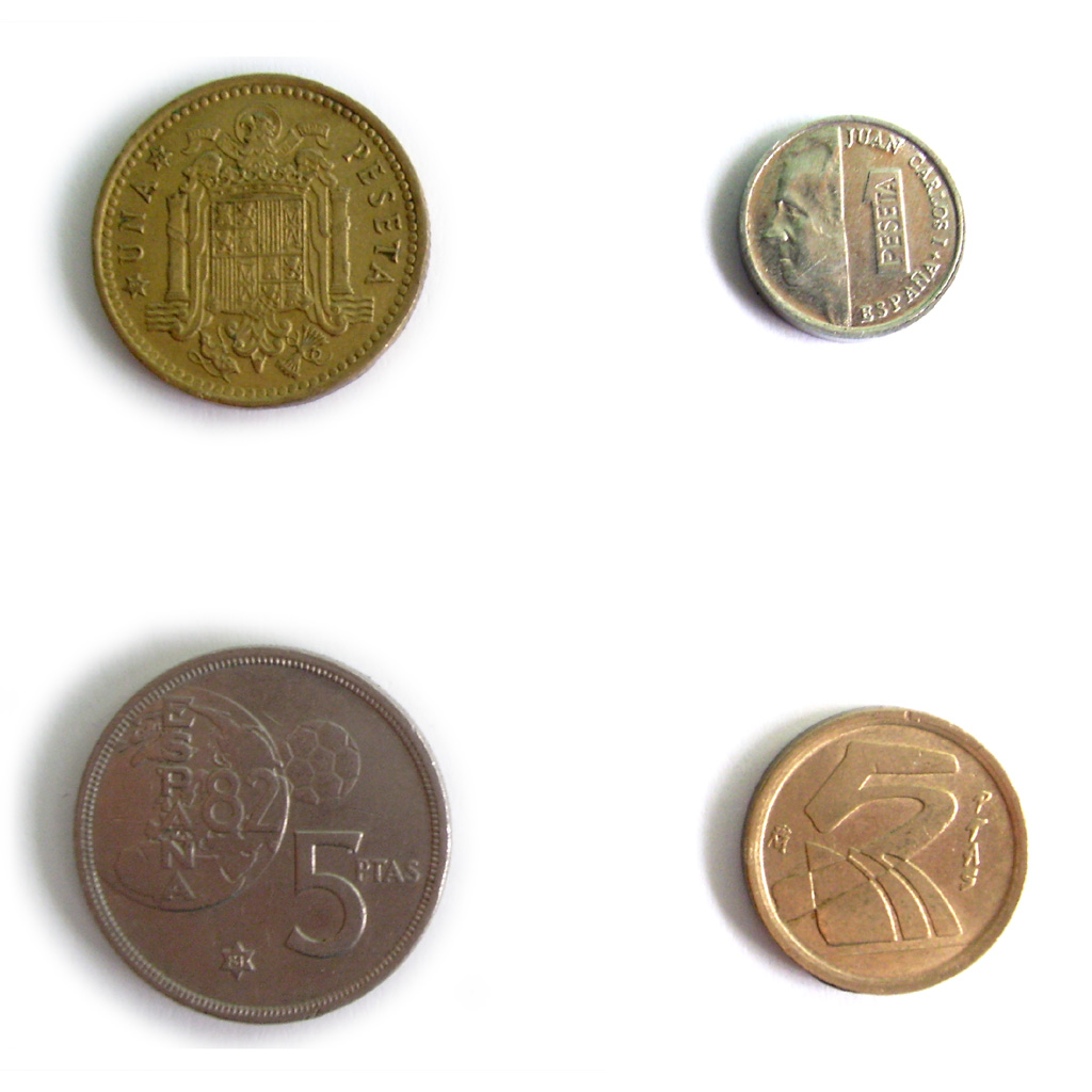 Una peseta y un duro de 1965 y 1980 y otra pareja de 1998 y 1997.